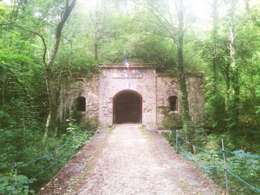 Fort Brulé entrée